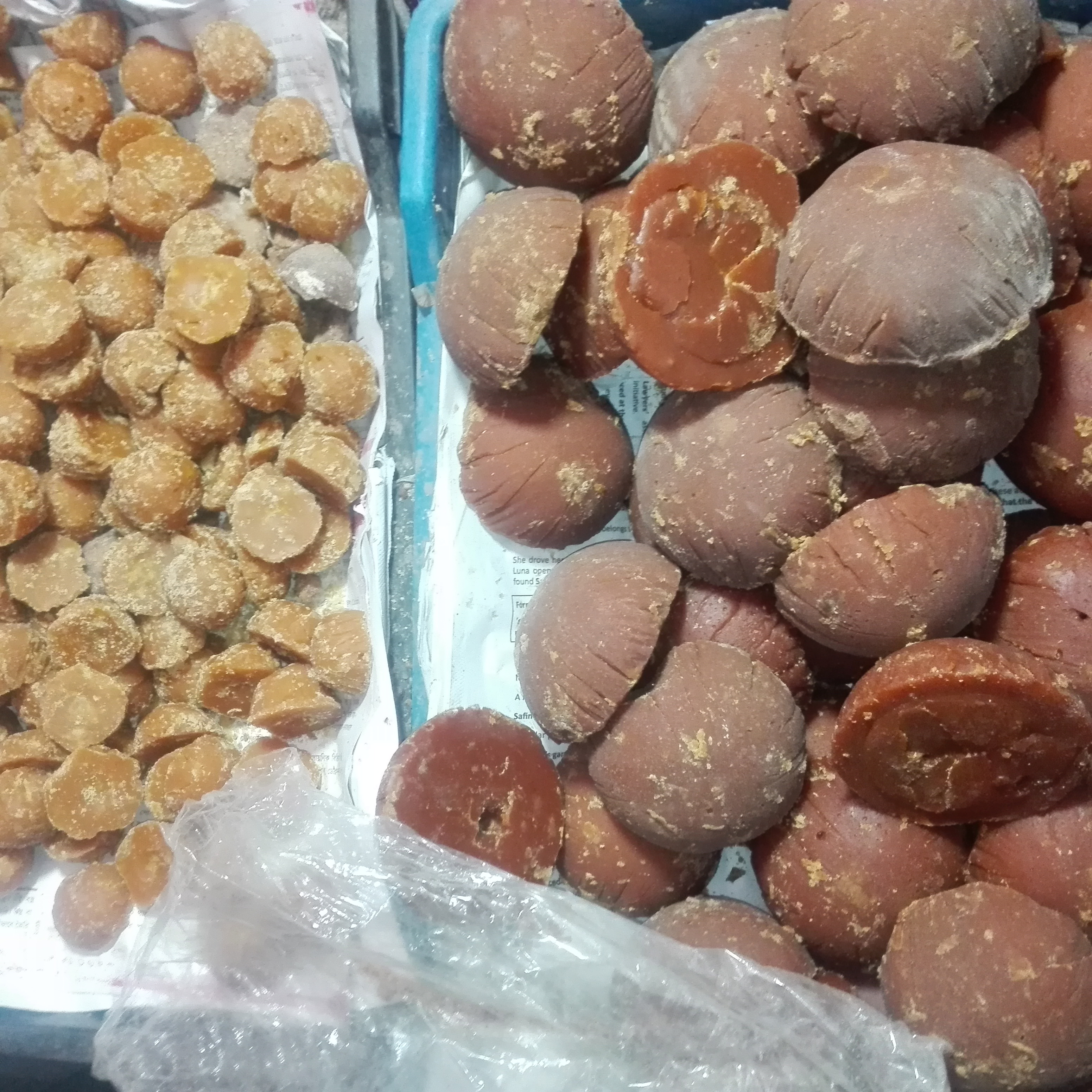 jagger